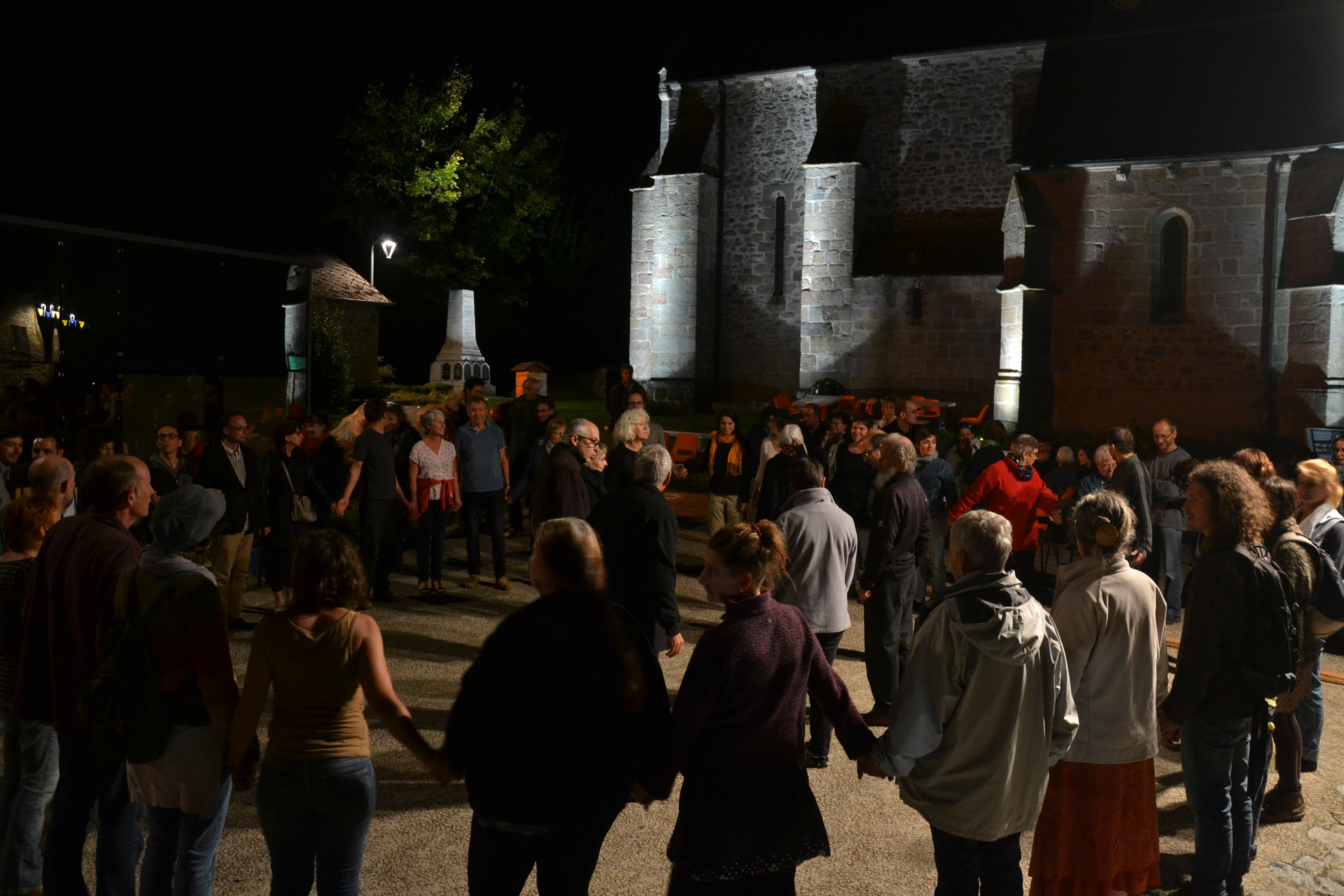 Ronde traditionnelle à Nedde (Haute-Vienne, France) lors de la Fête de la Montagne limousine 2017 (groupe Le Plancher Tremble).